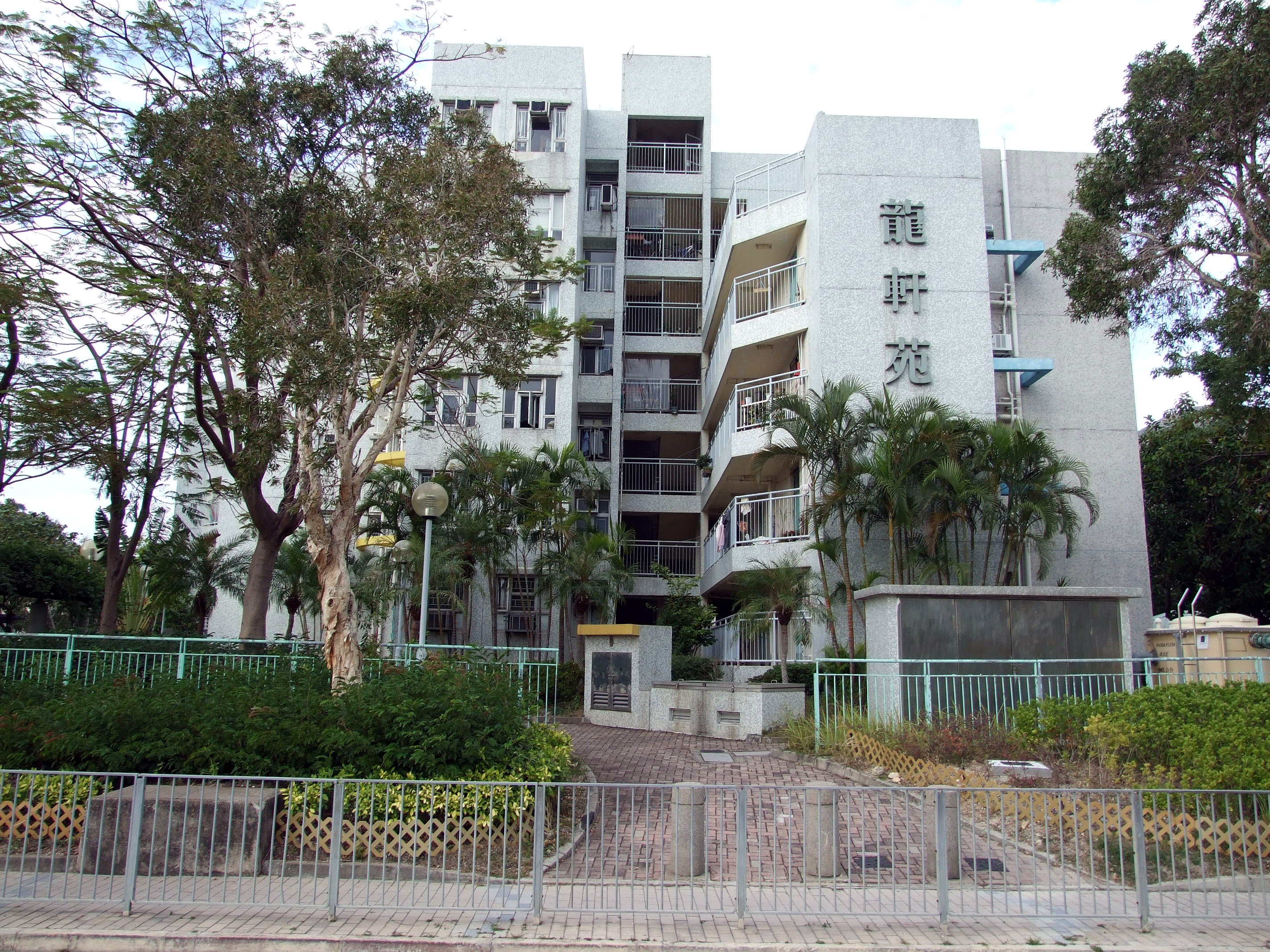 中文（香港）: 龍軒苑"A"座錦軒閣